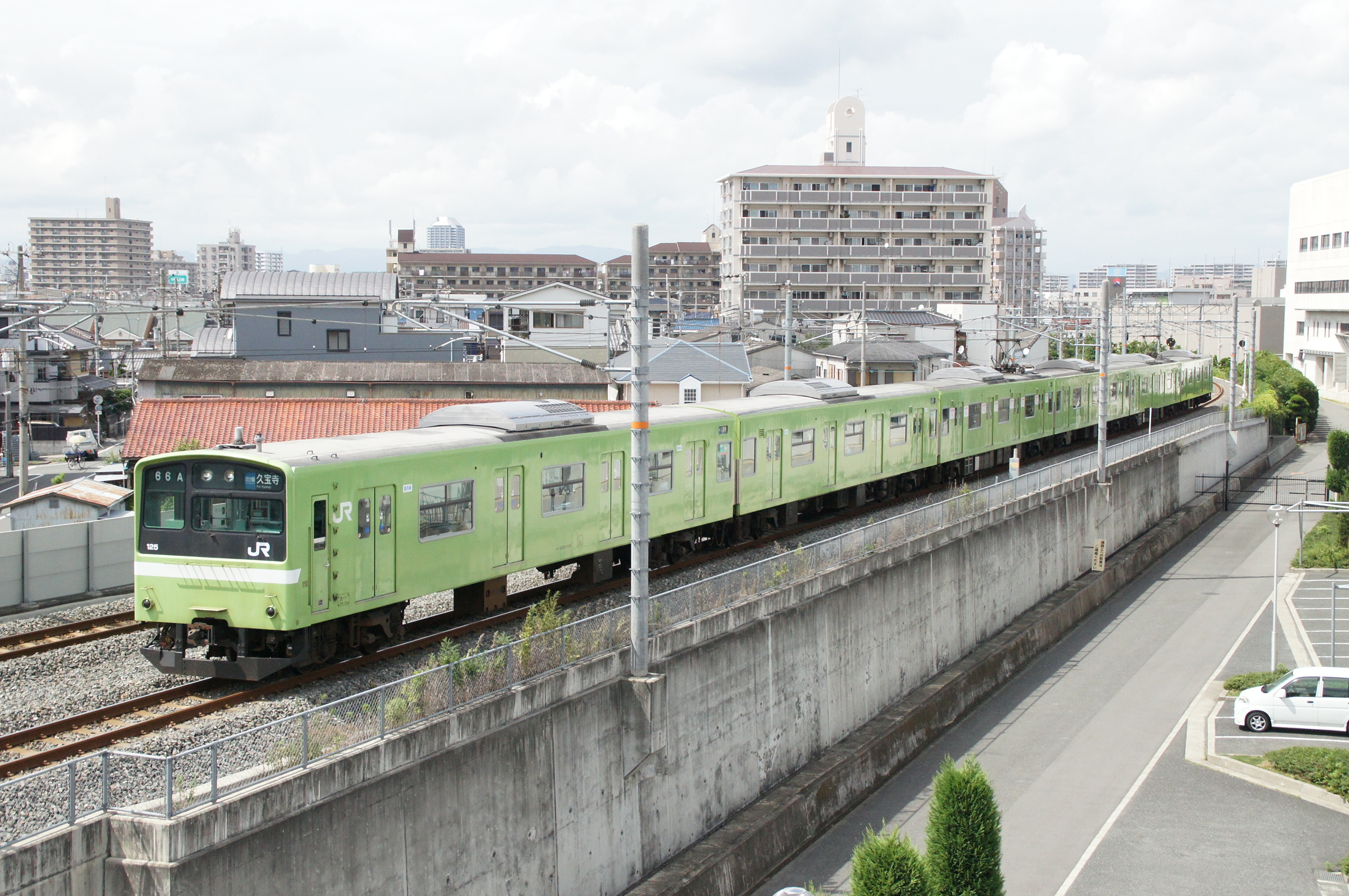 JR西日本 201系（おおさか東線）